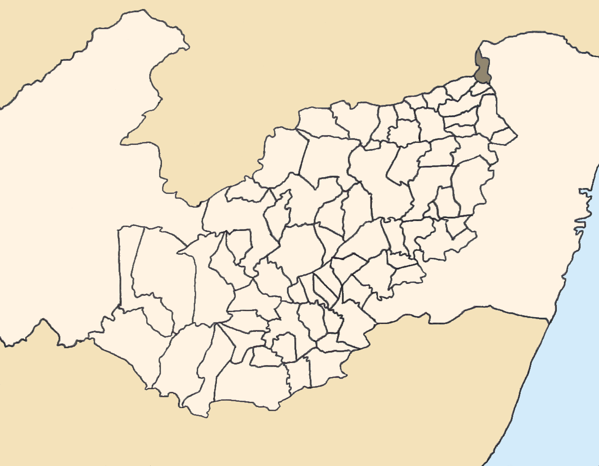 Mapa da mesorregião Agreste de Pernambuco (Brasil) subdivida em municípios. Em destaque, o município de São Vicente Ferrer. Map of the brazilian state of Pernambuco (mesorregião Agreste) showing the city of São Vicente Ferrer. Imagem tratada com o GIMP. Image made with GIMP.